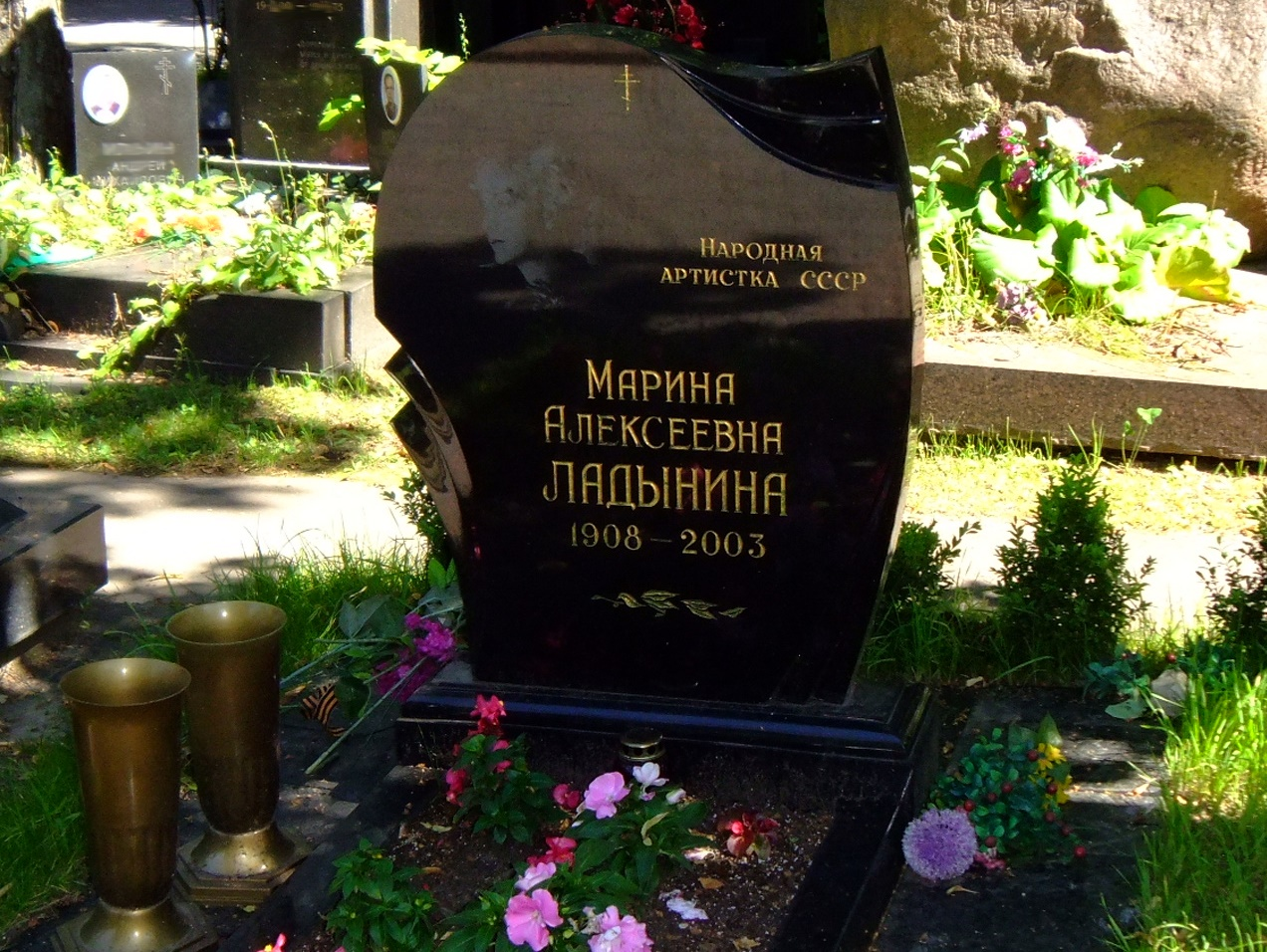 Памятник на Новодевичьем Ладыниной Марине Алексеевне (Москва, 2017г).